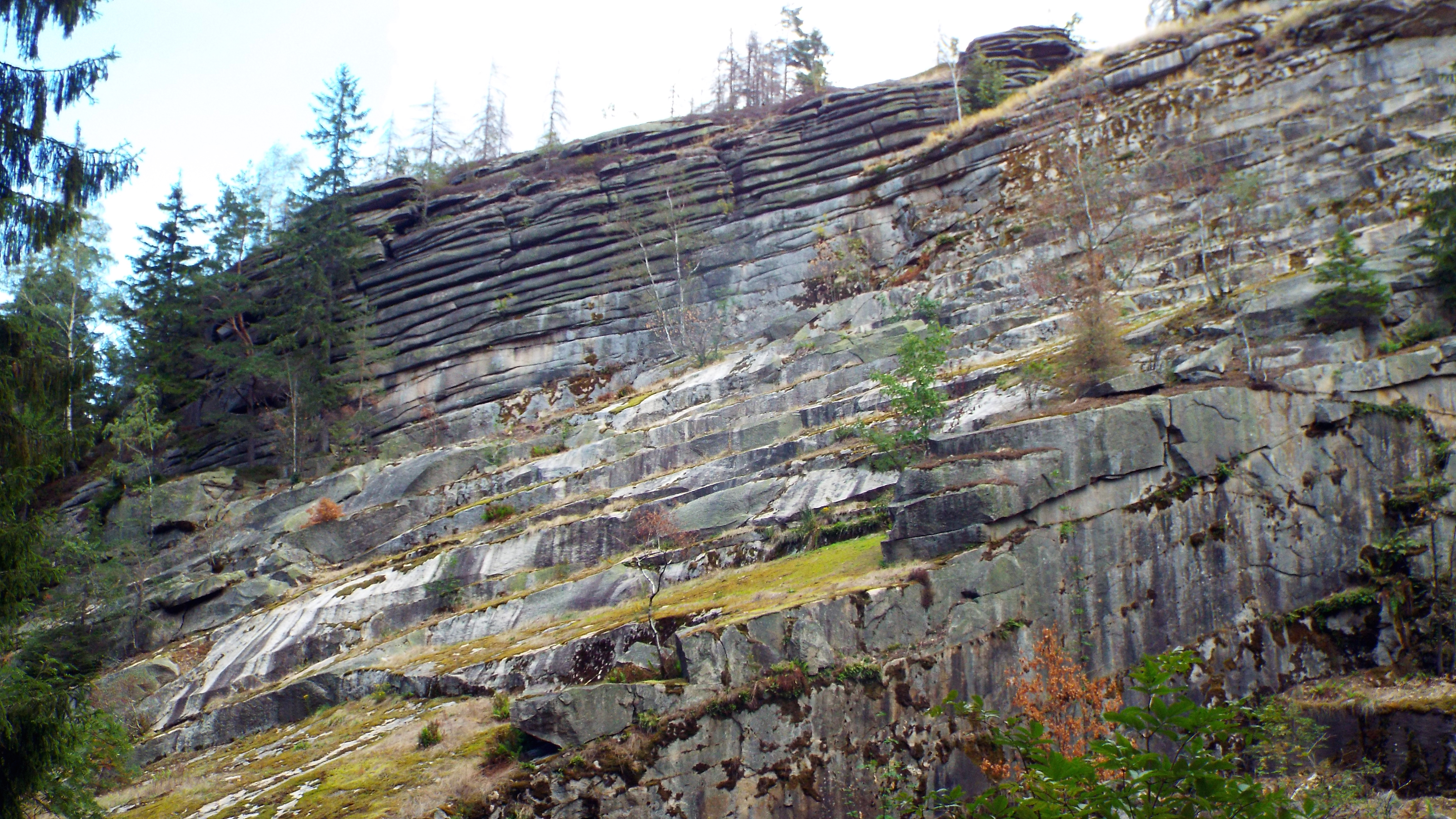 Der Alberts-Bruch zeigt in musterhafter Art die matratzenförmige Absonderung, bedingt durch Druckentlastungs-Klüftung. Der historische Bruch ist sehr gepflegt und kaum zugewachsen.